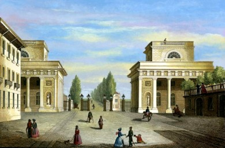 Porta Venezia in un ciclo di illustrazioni